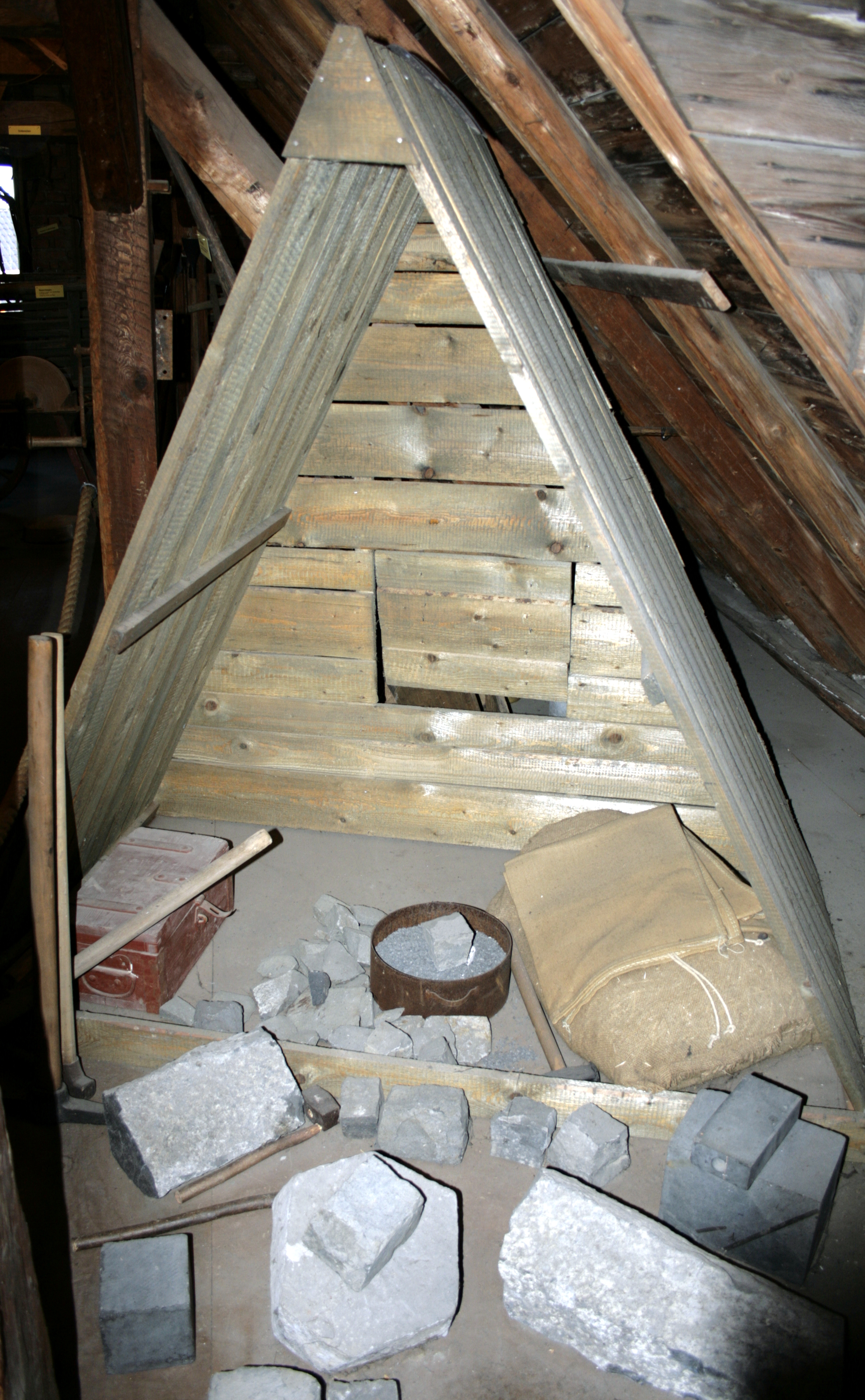 Schutzhütte eines Kippers (Basaltzurichters) im Heimatmuseum von Dornburg-Wilsenroth, Deutschland